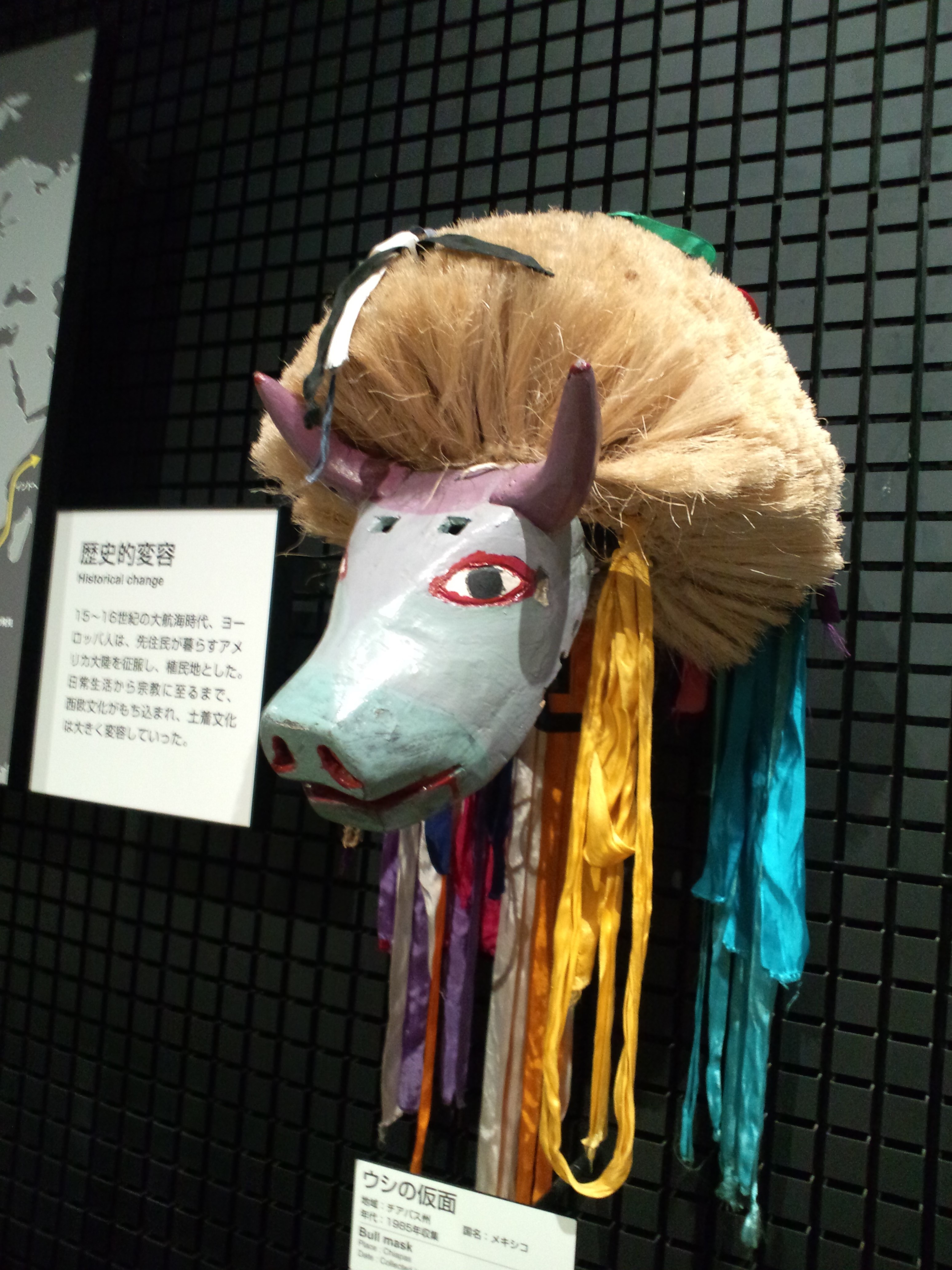 国立民族学博物館（大阪） ウシの仮面（メキシコ、チアバス州）